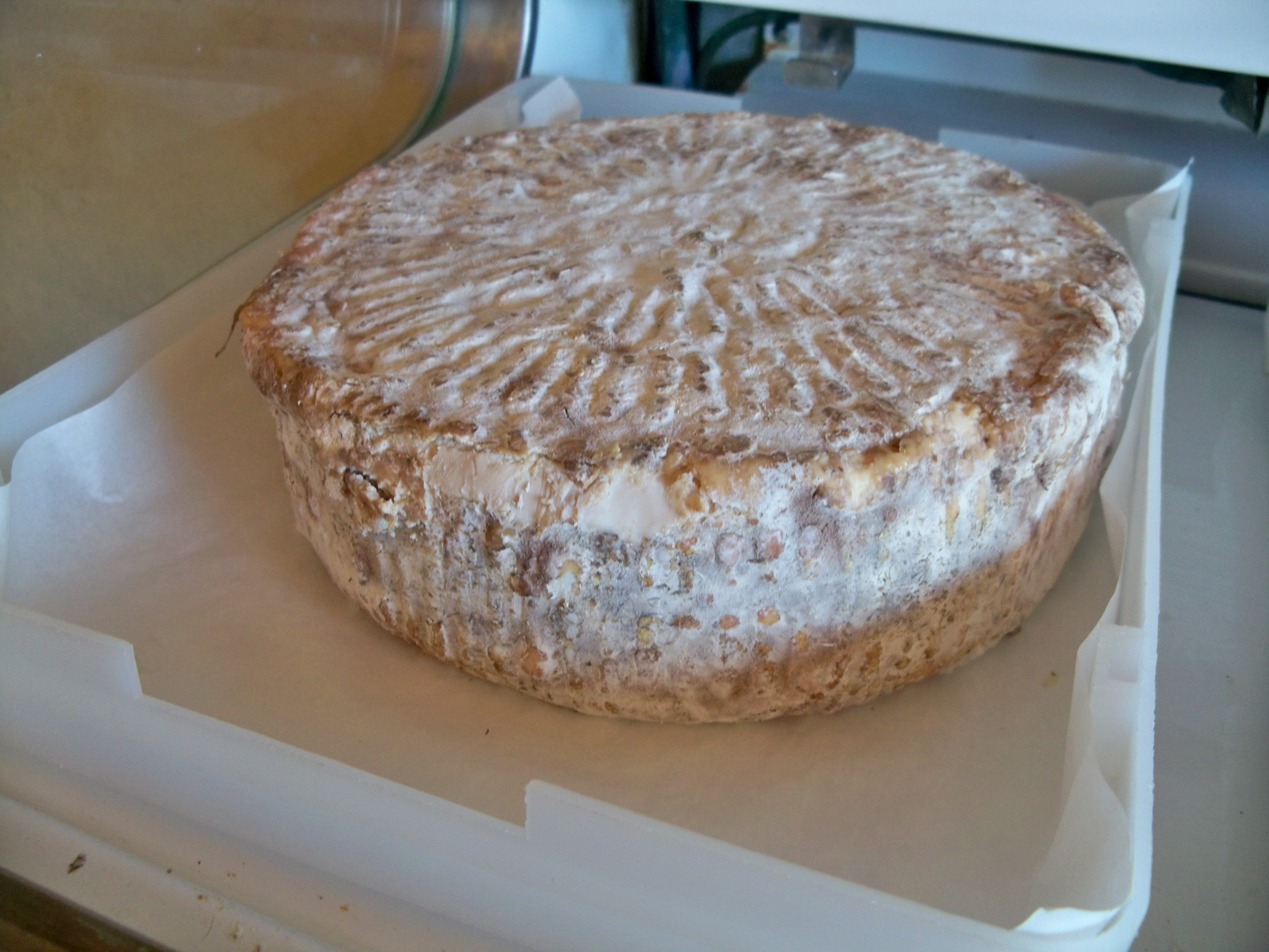 Tomme de chèvre du hameau des Anglars, L'Hospitaler (04)